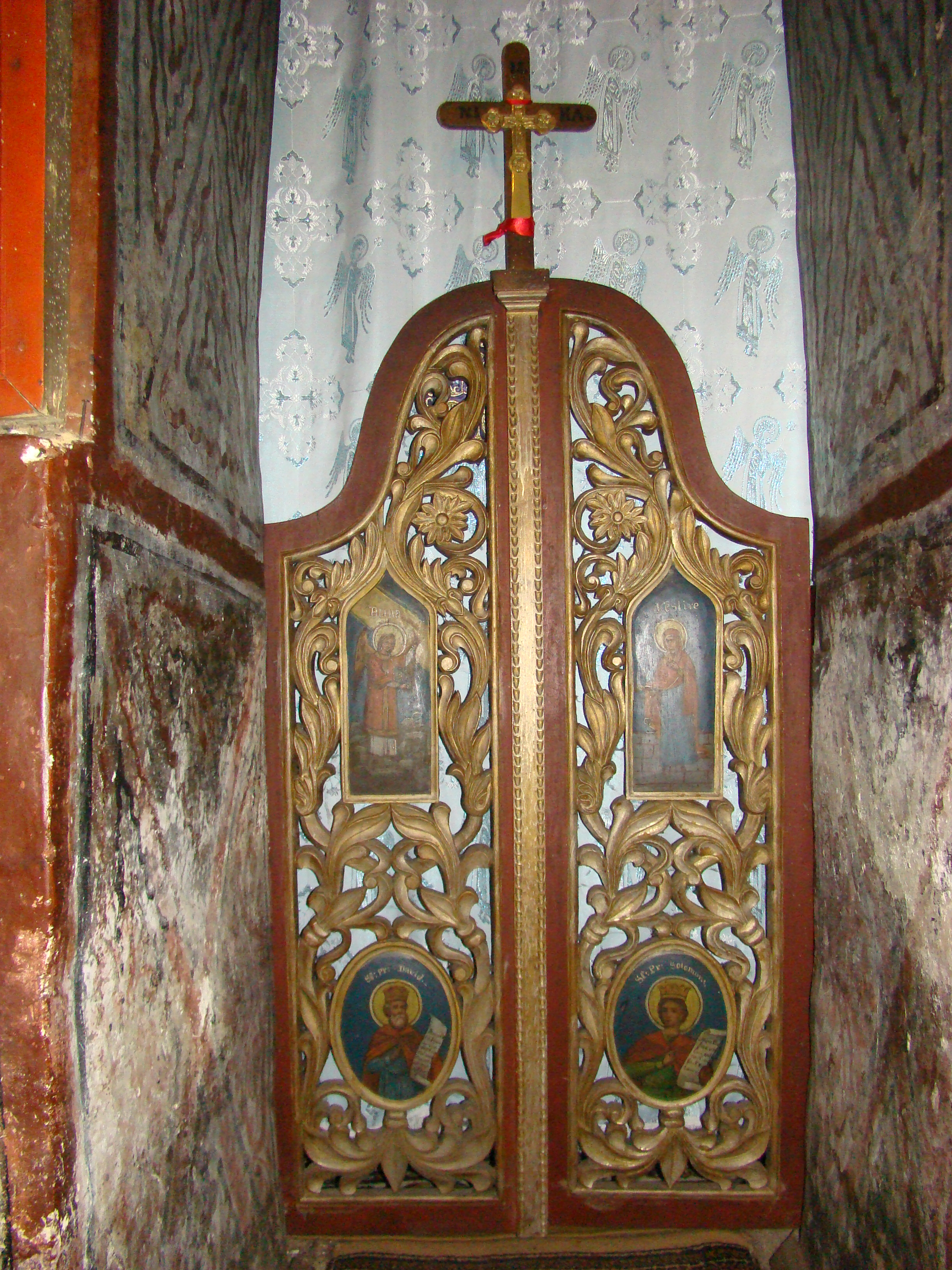 Biserica „Intrarea în Biserică a Maicii Domnului” sat Bărbătești, cătun Mierlești, județul Vâlcea